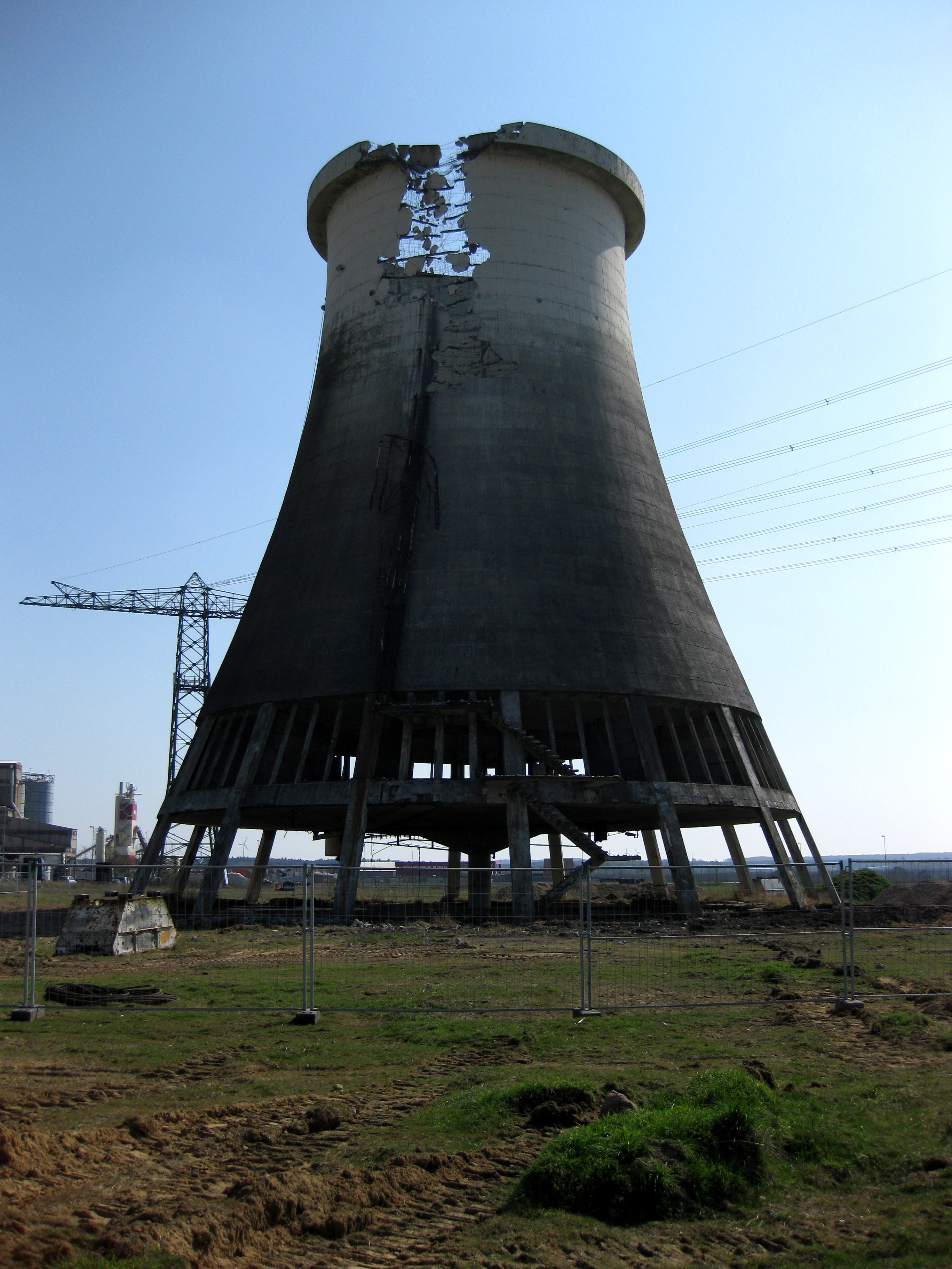 2009 wurde der letzte Baukörper des Metallhüttenwerks Lübeck in Herrenwyk, der 1978 errichtete Kühlturm, abgerissen - hier am Tag nach Abrissbeginn im April 2009